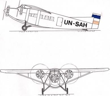 Фарман F.300